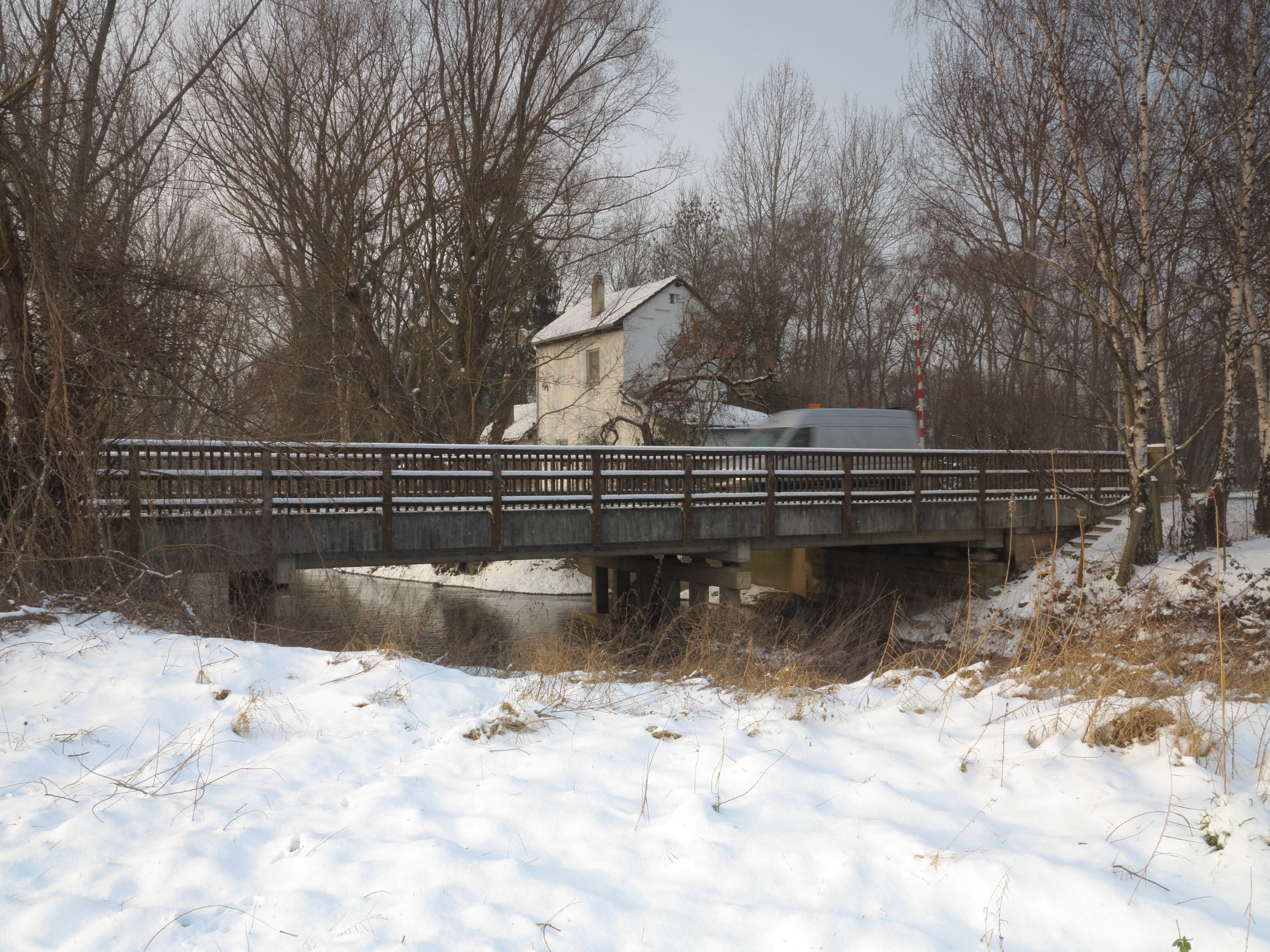 Braunschweig: Die Okerbrücke Wiesental